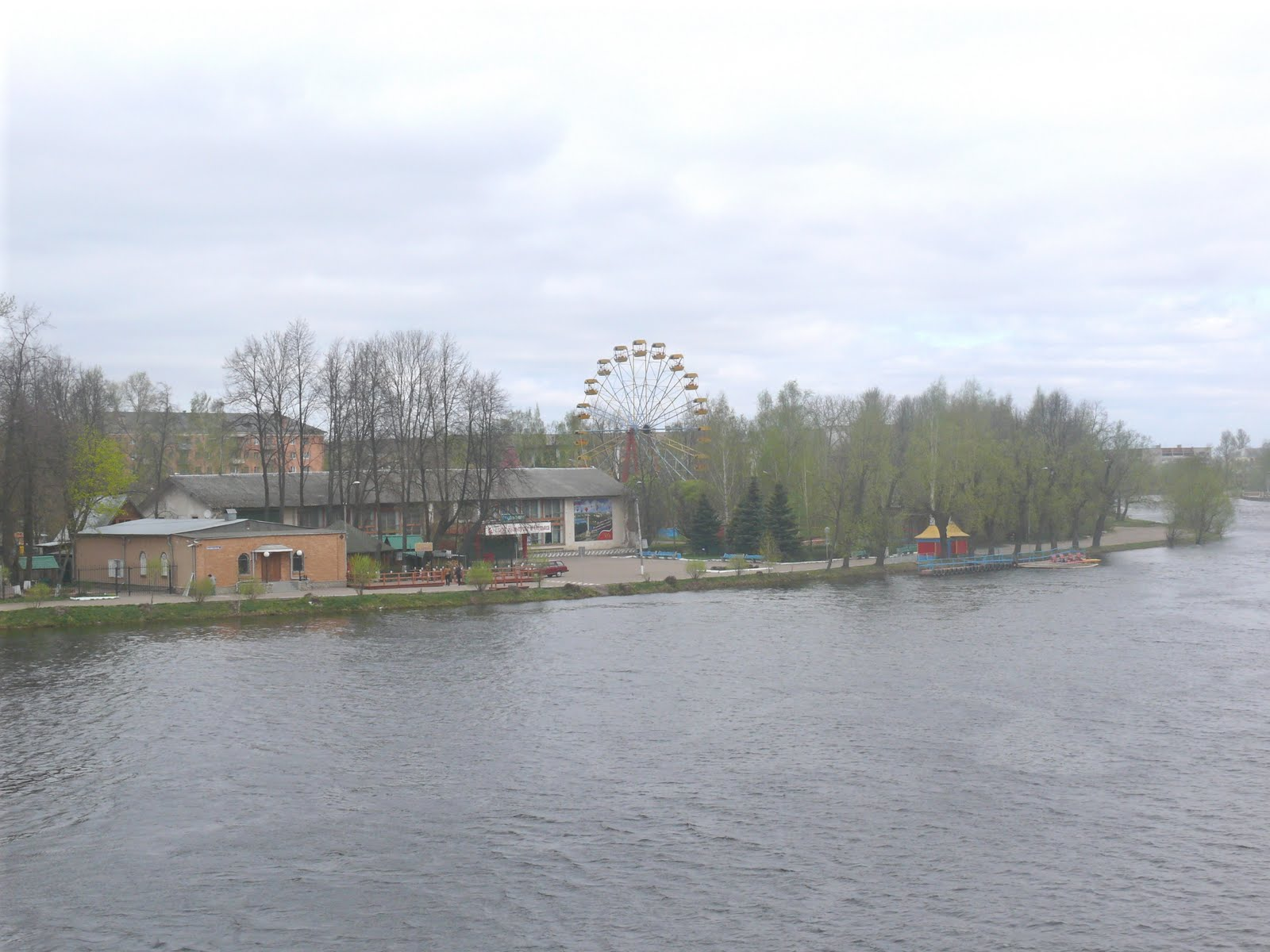 Великолукский городской парк культуры и отдыха